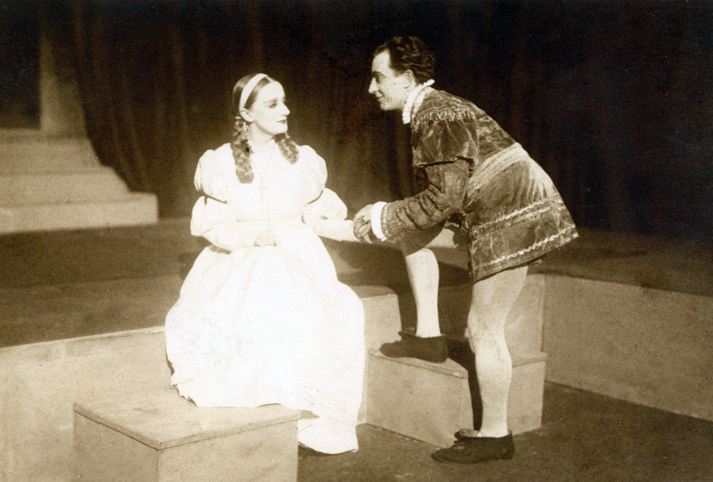 William Shakespeare, Hamlet, Narodno gledališče v Mariboru 1934. Na fotografiji: Elvira Kralj (Ofelija), Franjo Blaž (Leart).